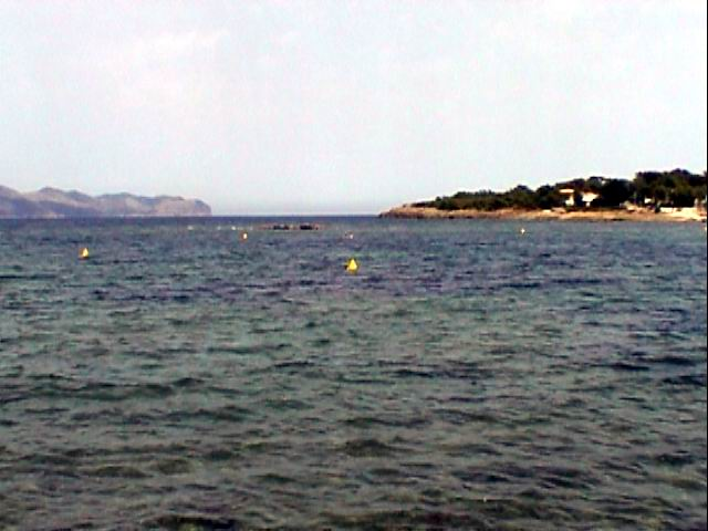 Moře na Mallorce